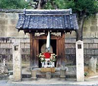 Kubi-kiri-jizō